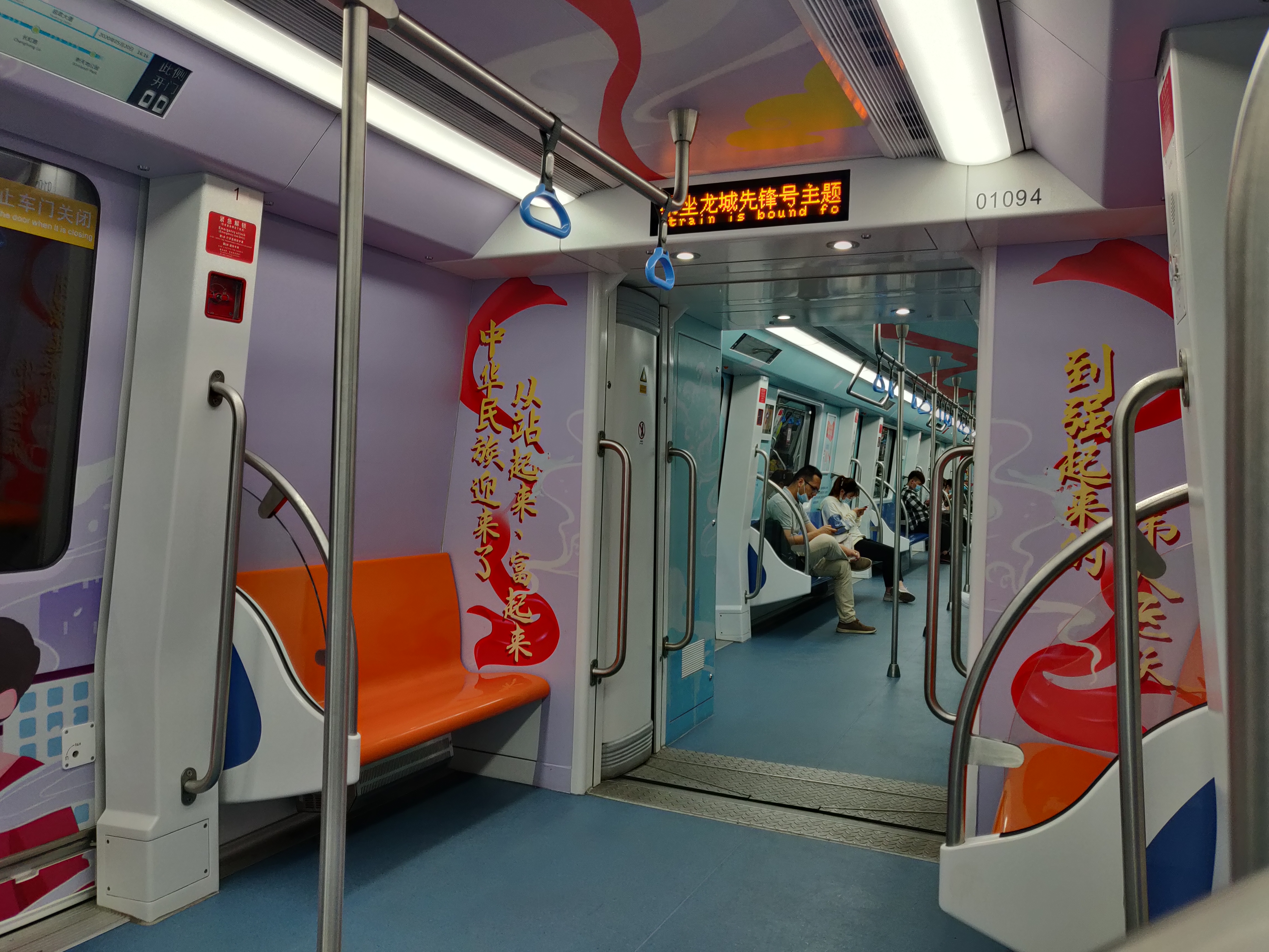 龙城先锋号列车内部